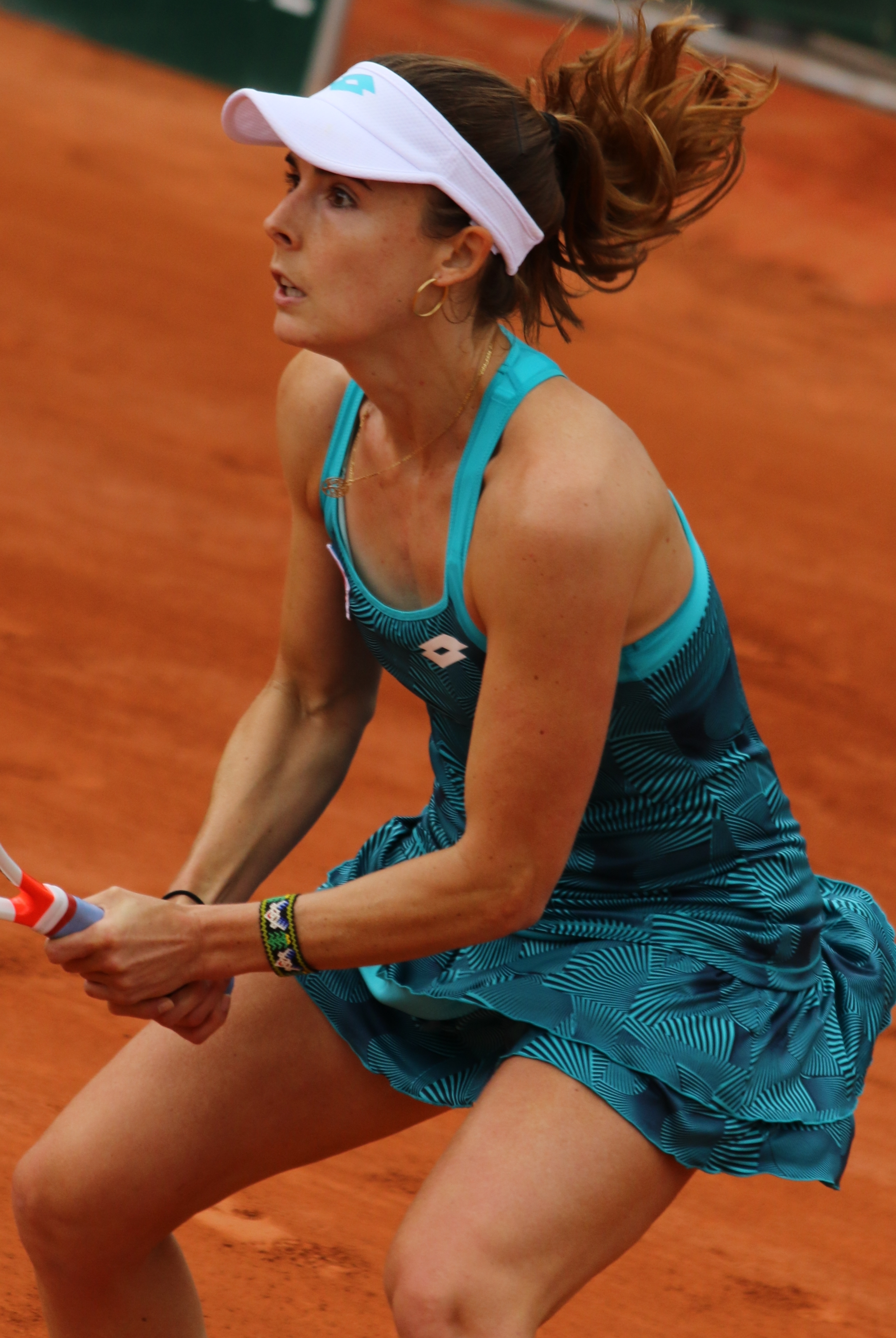 Cornet RG19 (14)